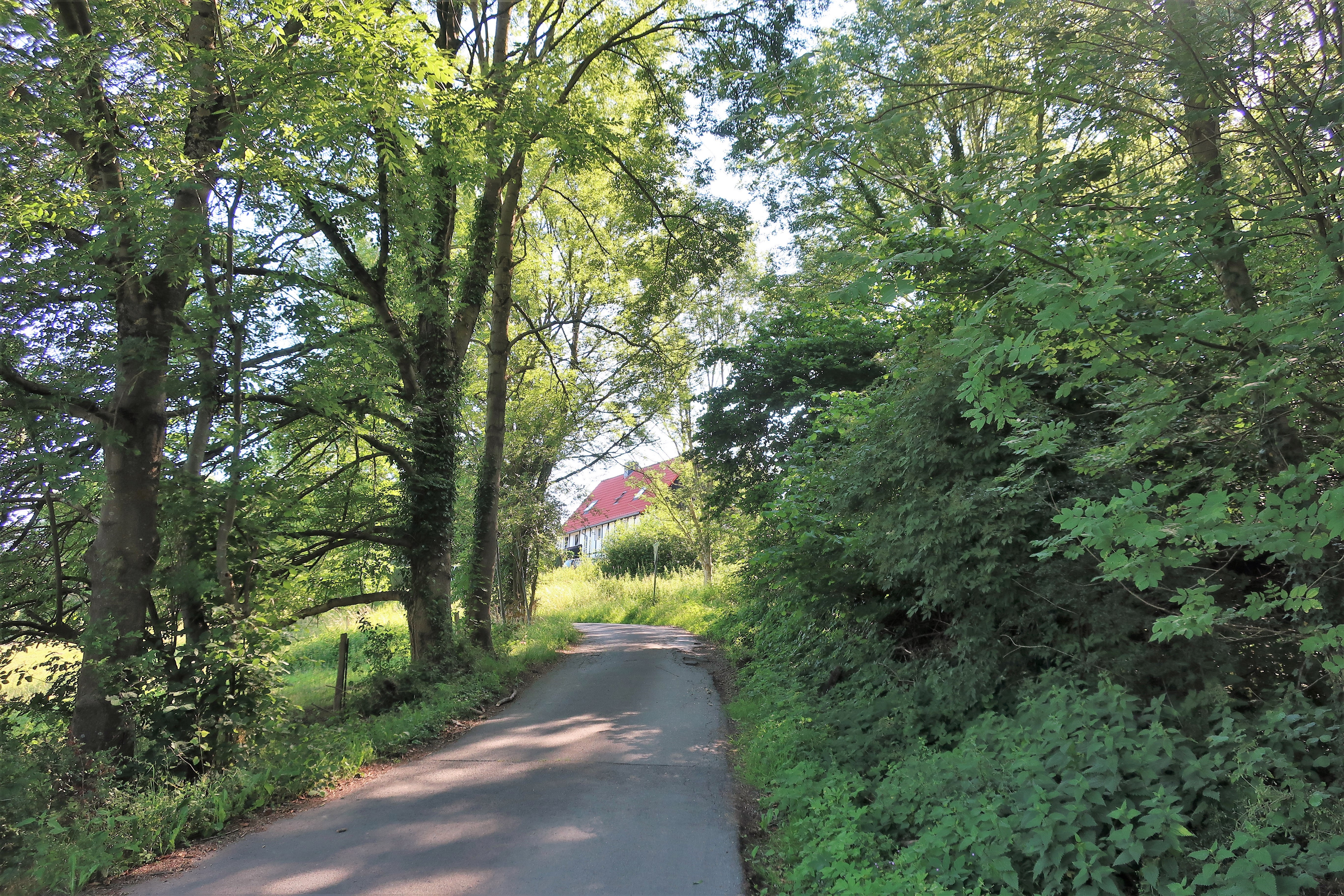 Geschützter Landschaftsbestandteil 1.4.2.63 „Feuchtgebiet Aske“ in Hagen-Westerbauer, beidseitig der Gabelsbergerstraße an der Stadtgrenze zu Gevelsberg. Es handelt sich um einen Bachlauf und vernäßte Wiesenzonen mit einem Teich.